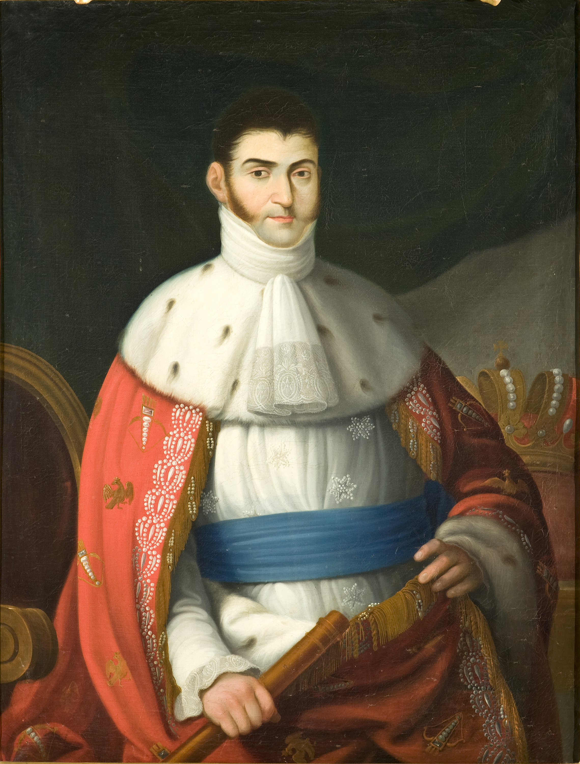 Retrato de Agustín de Iturbide (1783-1824)